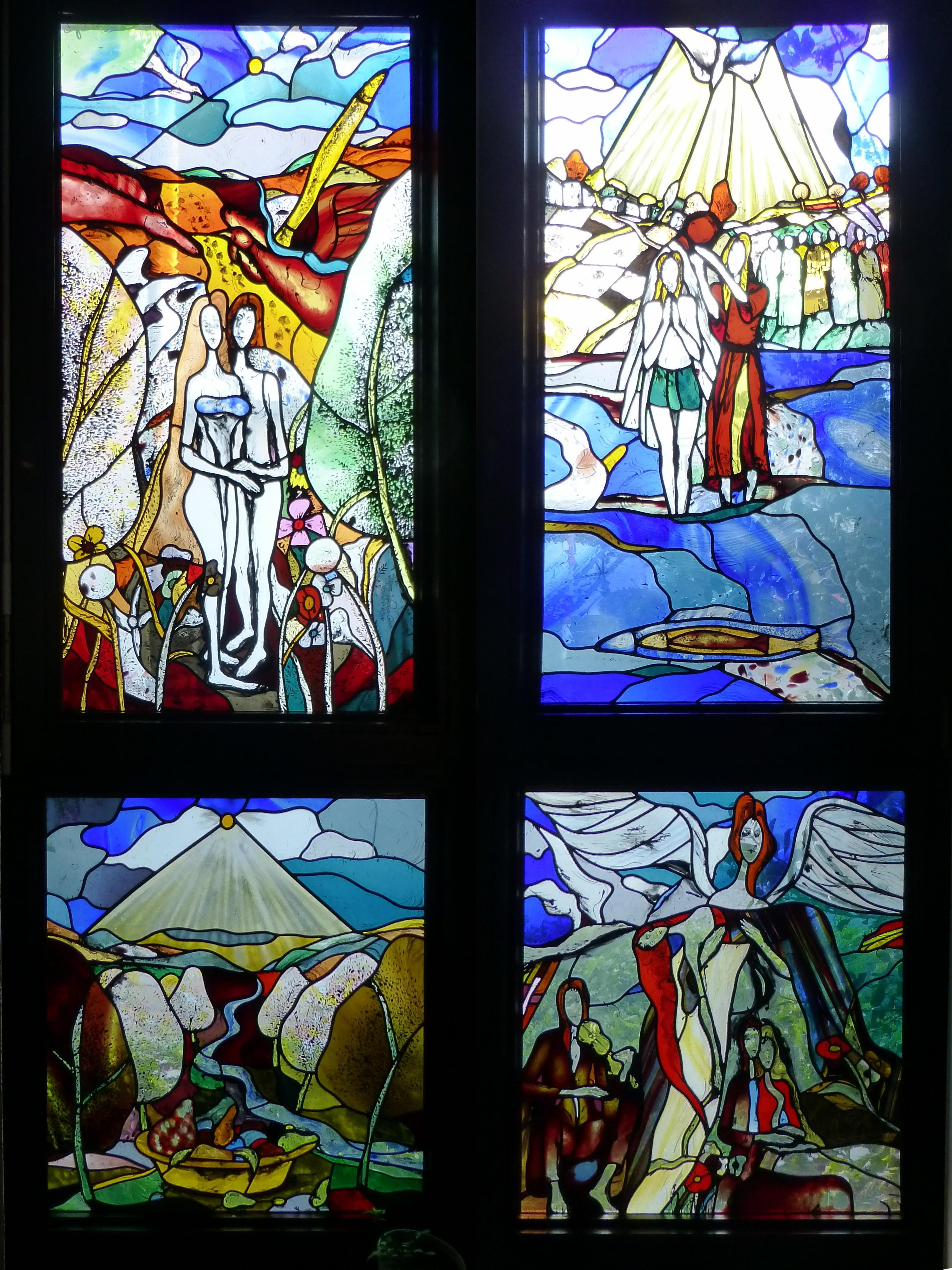 die beiden Fenster in der Seitenkapelle der Guthirtenkirche in Lustenau